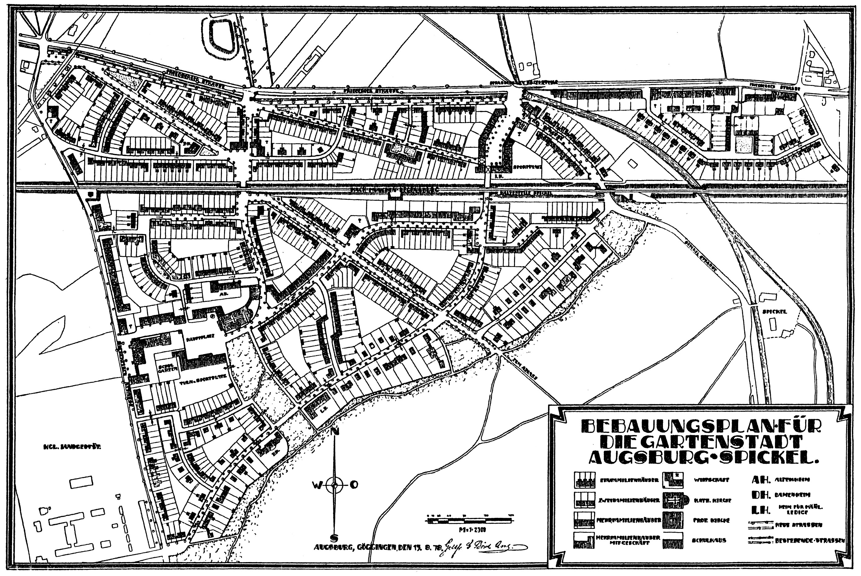 Deitsch: ursprünglicher Bebauungsplan um 1919